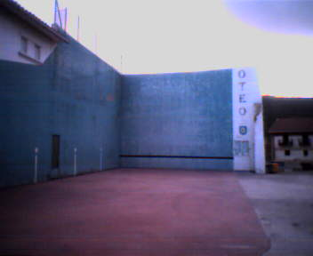 Oteoko pilotalekua